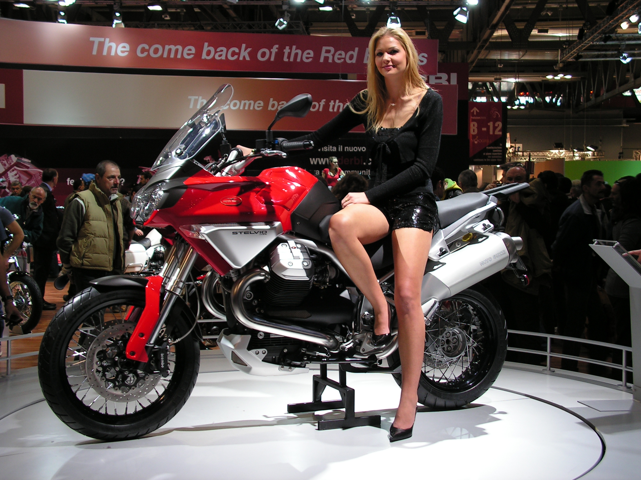 Moto Guzzi Stelvio - EICMA 2007, Milan (Italy)